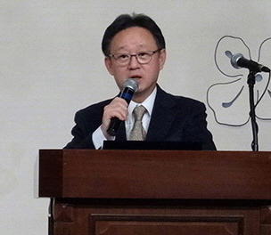 신일산업주식회사 2015년도 신년회 (김영)